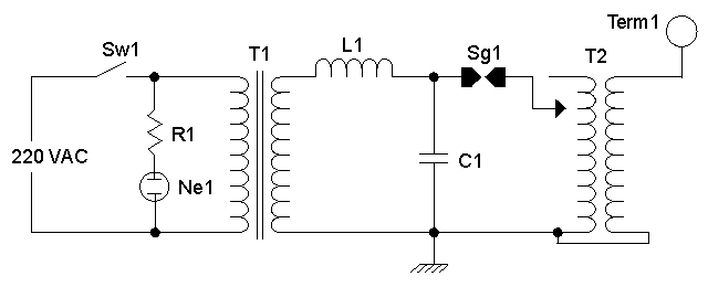 Esquema Elétrico de uma Bobina de Testa